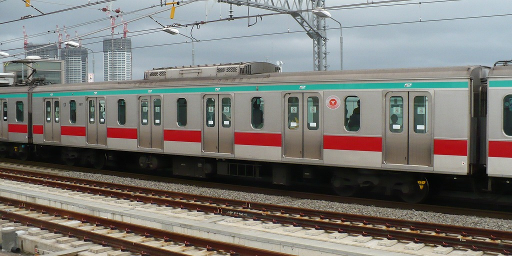 東急5000系車両